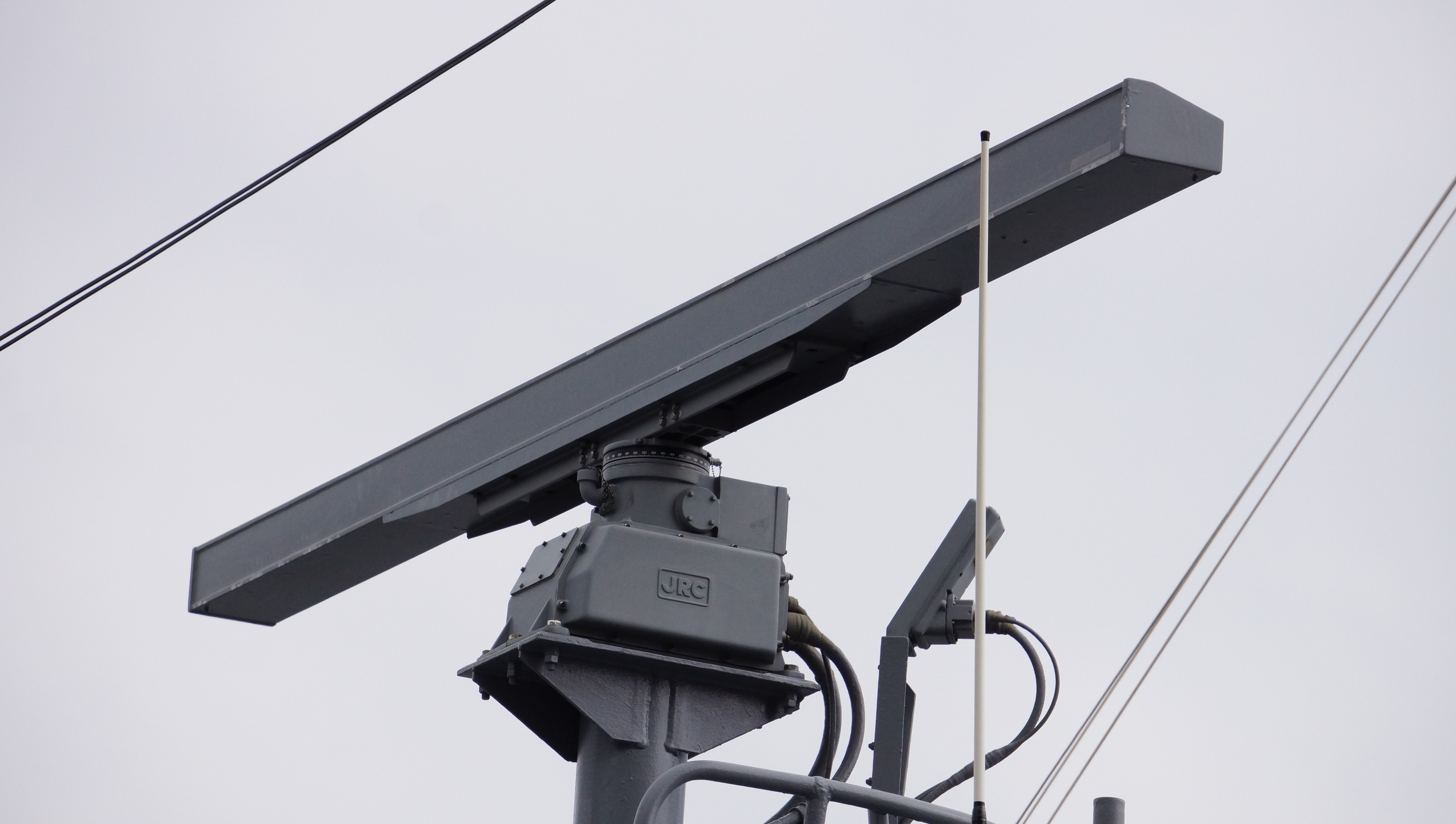 海上自衛隊 掃海艇まきしま（MSC-677） OPS-39Y対水上捜索レーダー。 13年3月10日 大阪ATCにて。